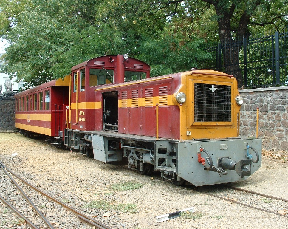 Mk48-as mozdony a Mátravasút Gyöngyös állomásán.